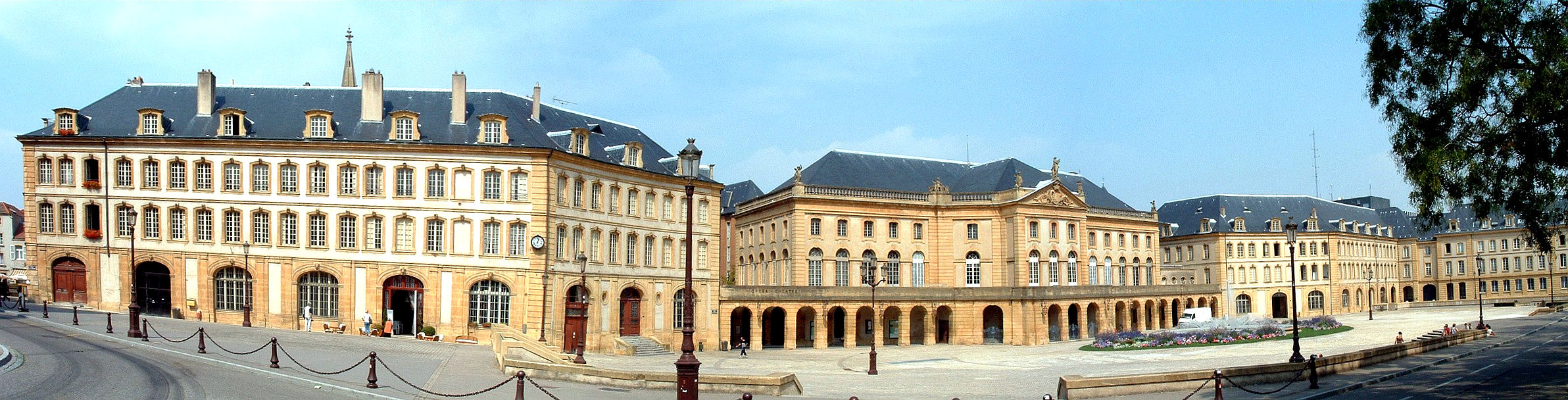 Metz - Place de la Comédie - Ensemble